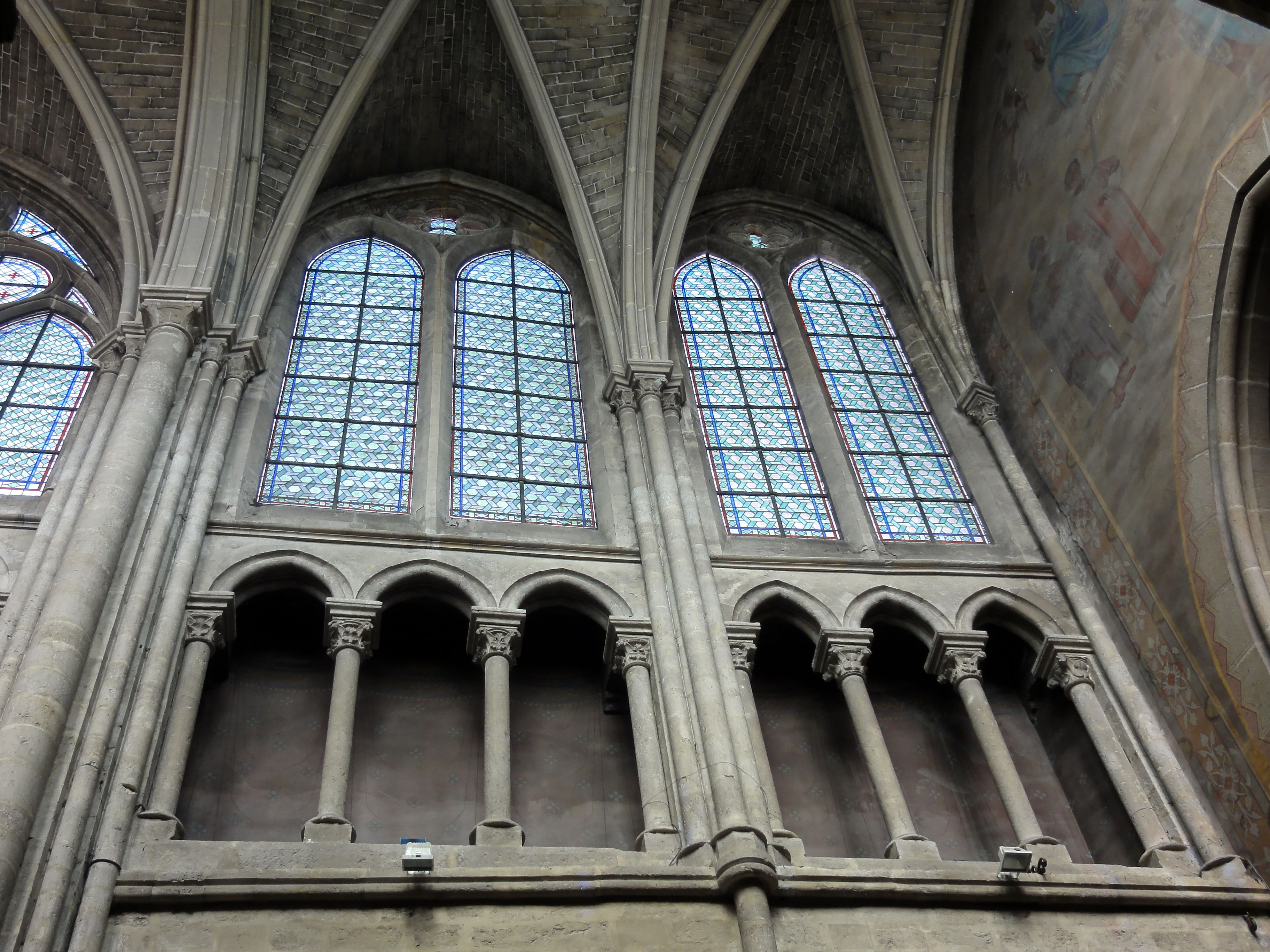 Parties hautes du chœur, côté nord.